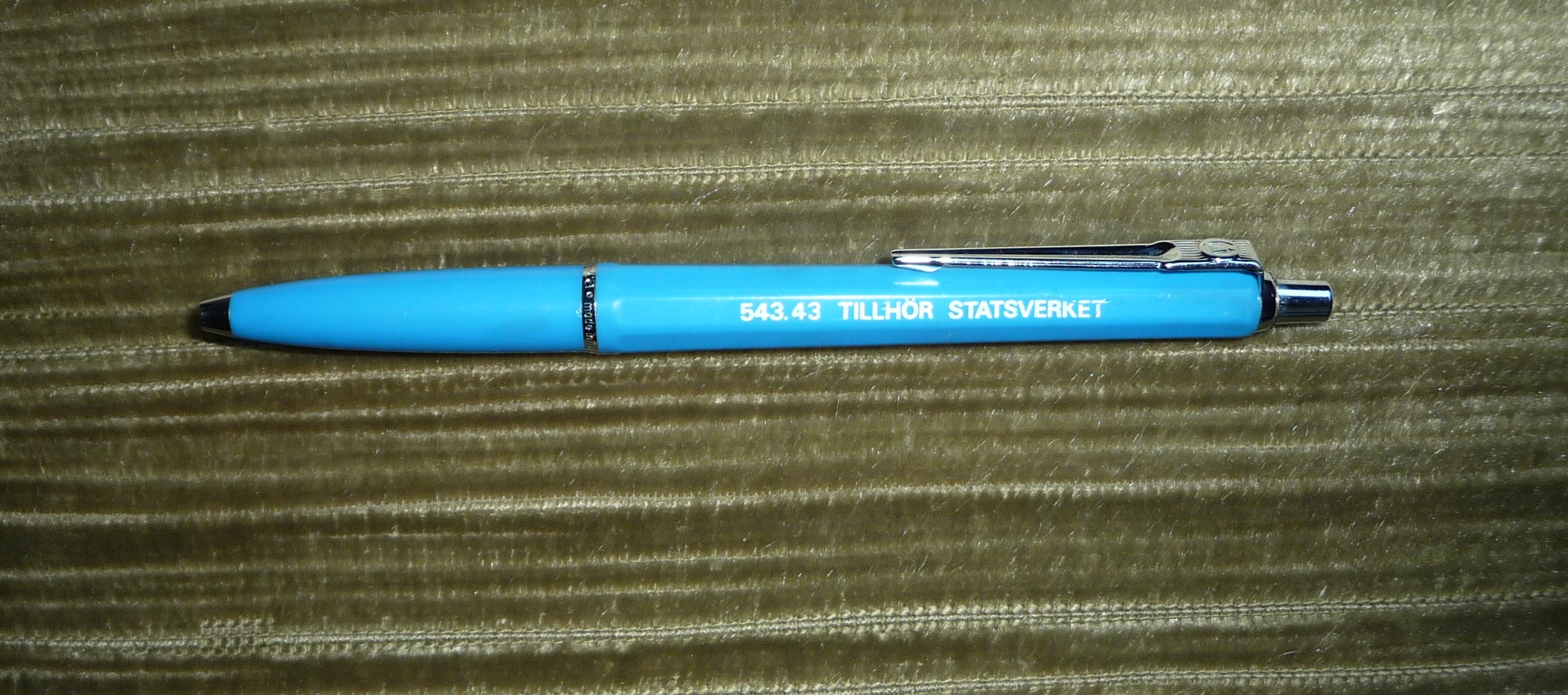 Tillhör statsverket, kulspetspenna, Ballograf